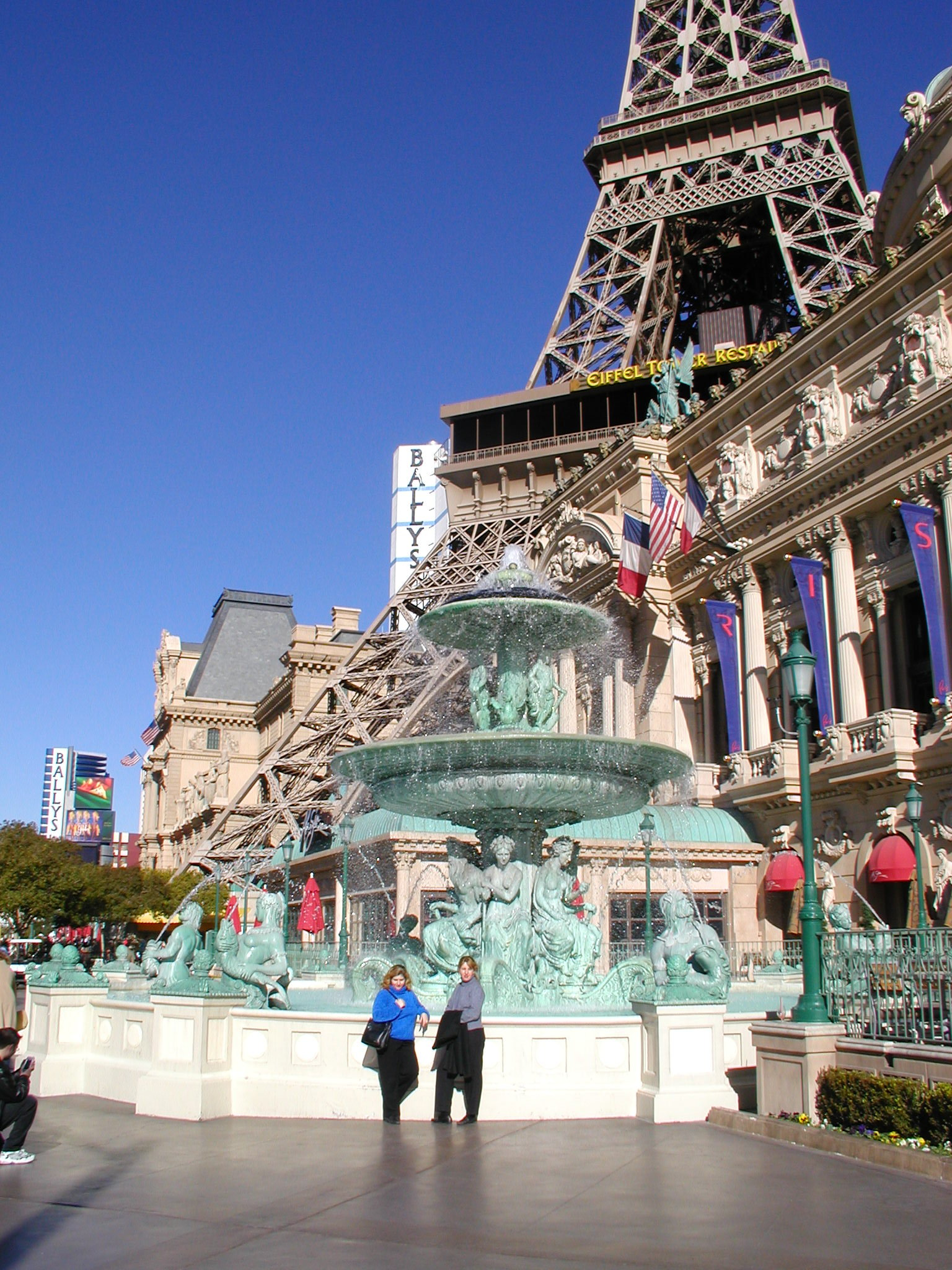 A Las Vegas Boulevard, mais conhecida como "STRIP". Nesta avenida ficam localizados os maiores cassinos da cidade.